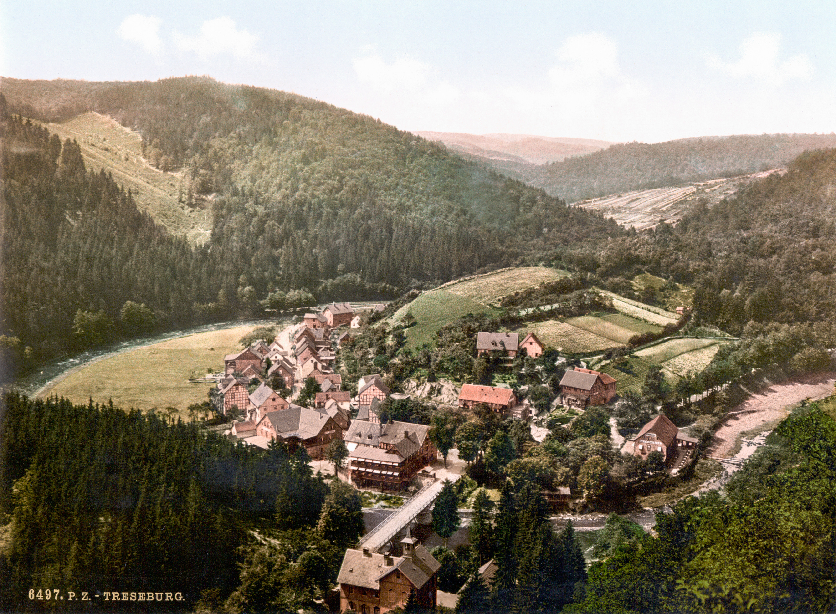 Treseburg